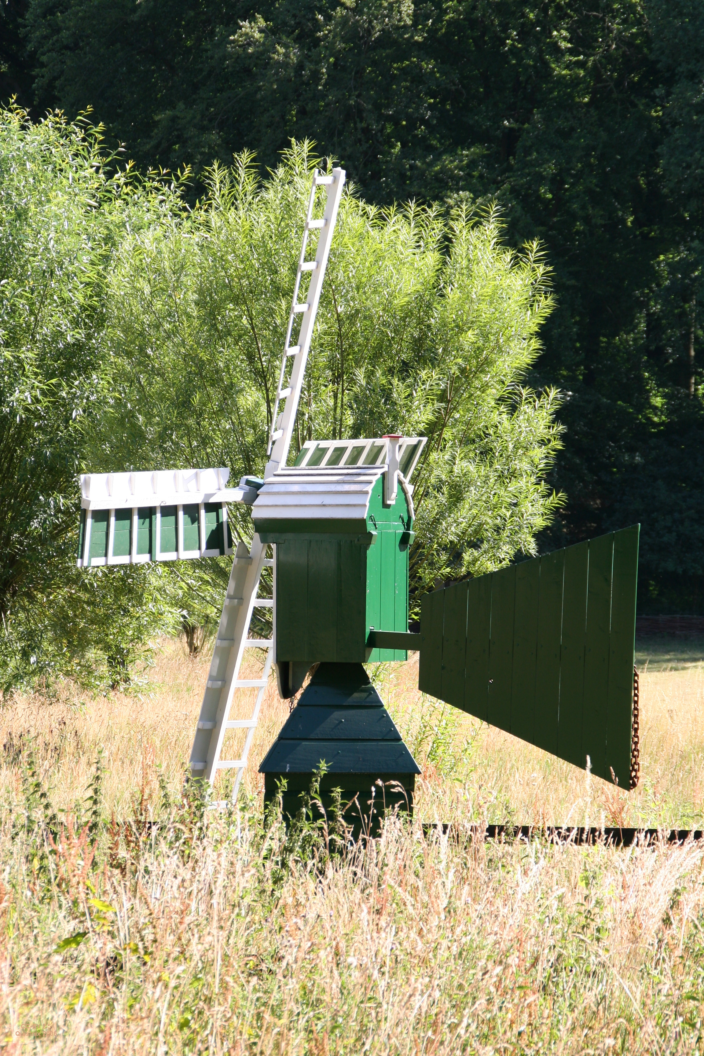 Weidemolen of aanbrengertje, Nederlands Openluchtmuseum. Eigen werk.